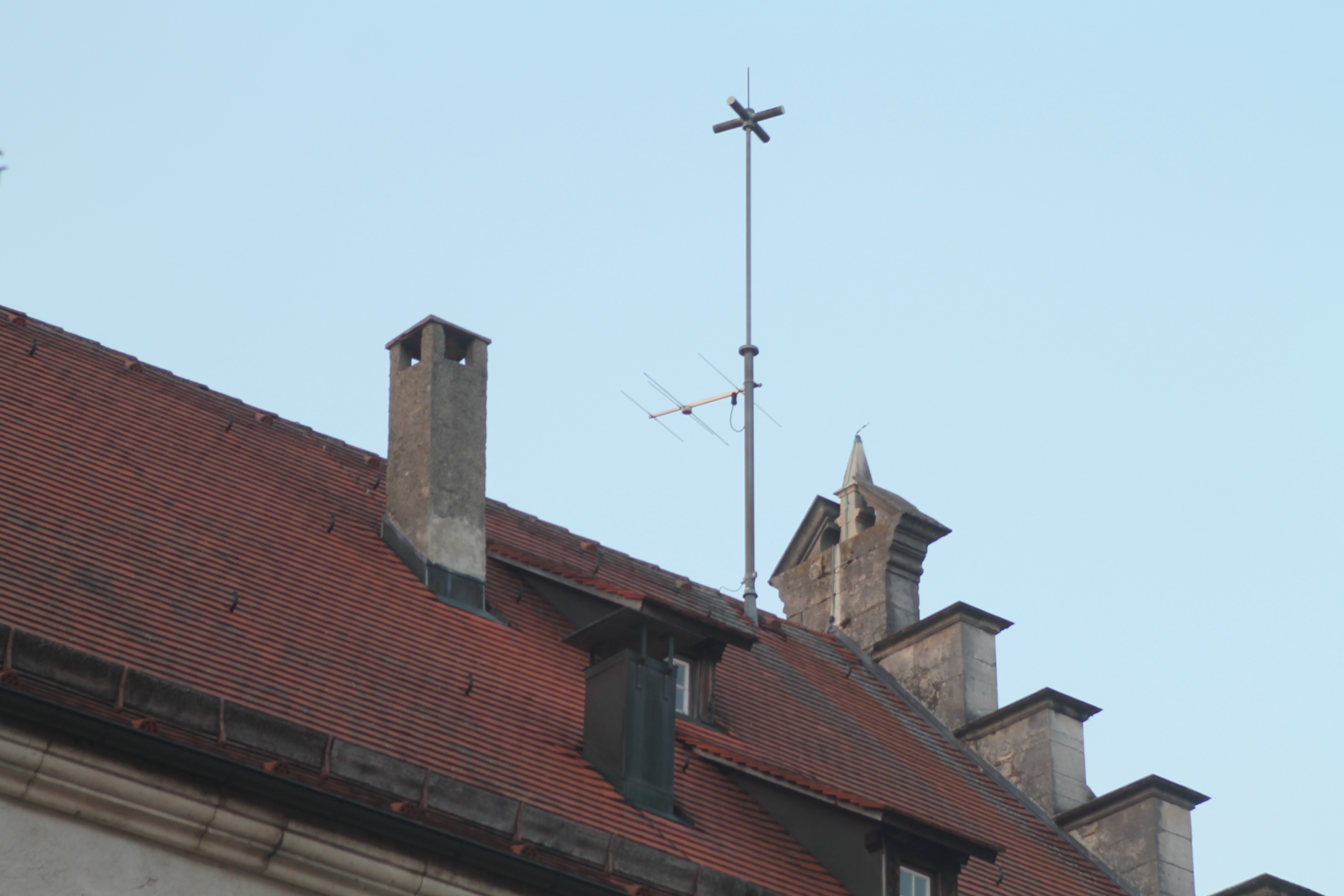 Sendeantenne des SWR auf Schloss Hellenstein - OpenStreetMap(Info)